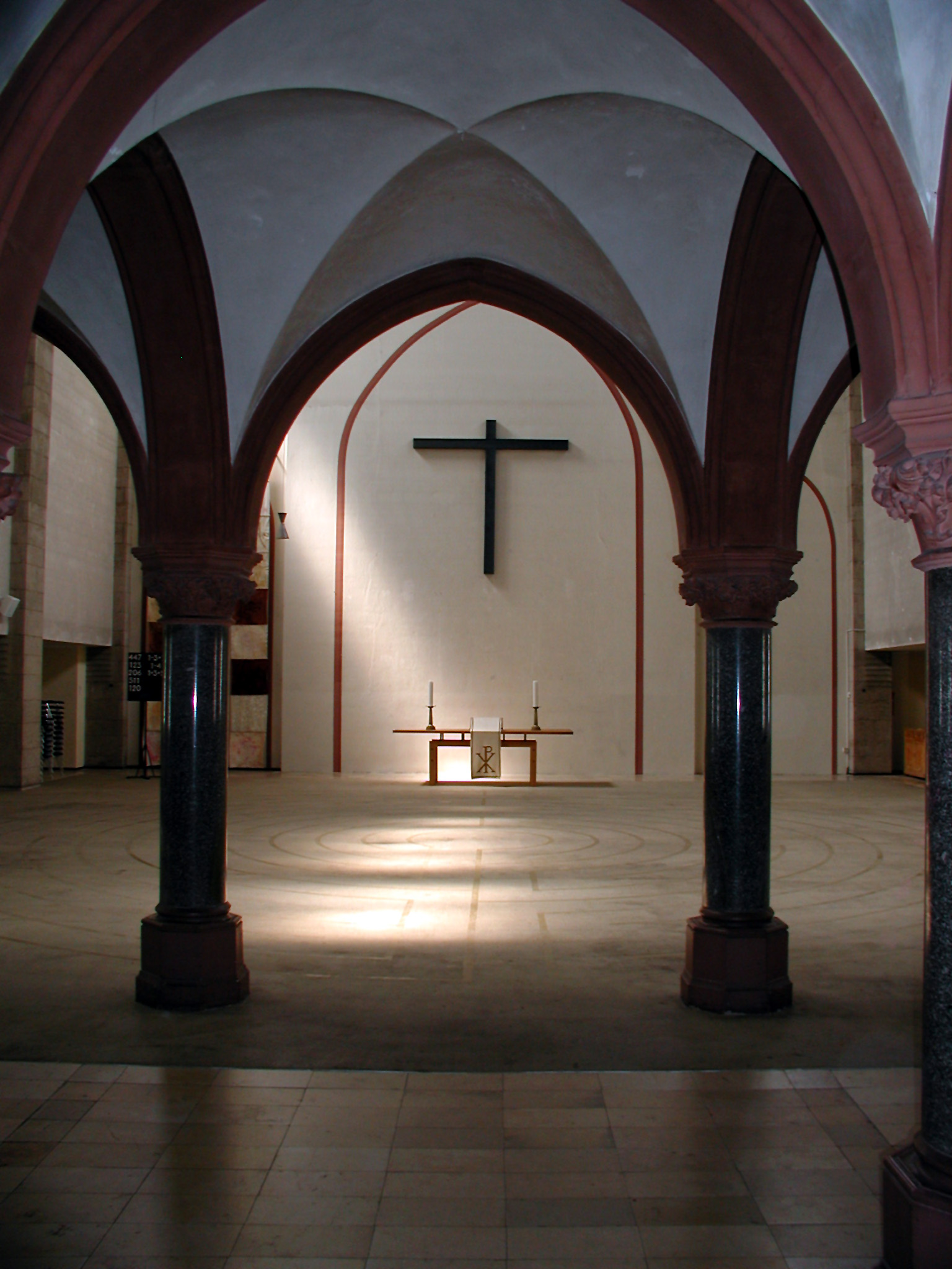 Köln, Christuskirche am Stadtgarten, Kreuzgratgewölbe und Innenraum